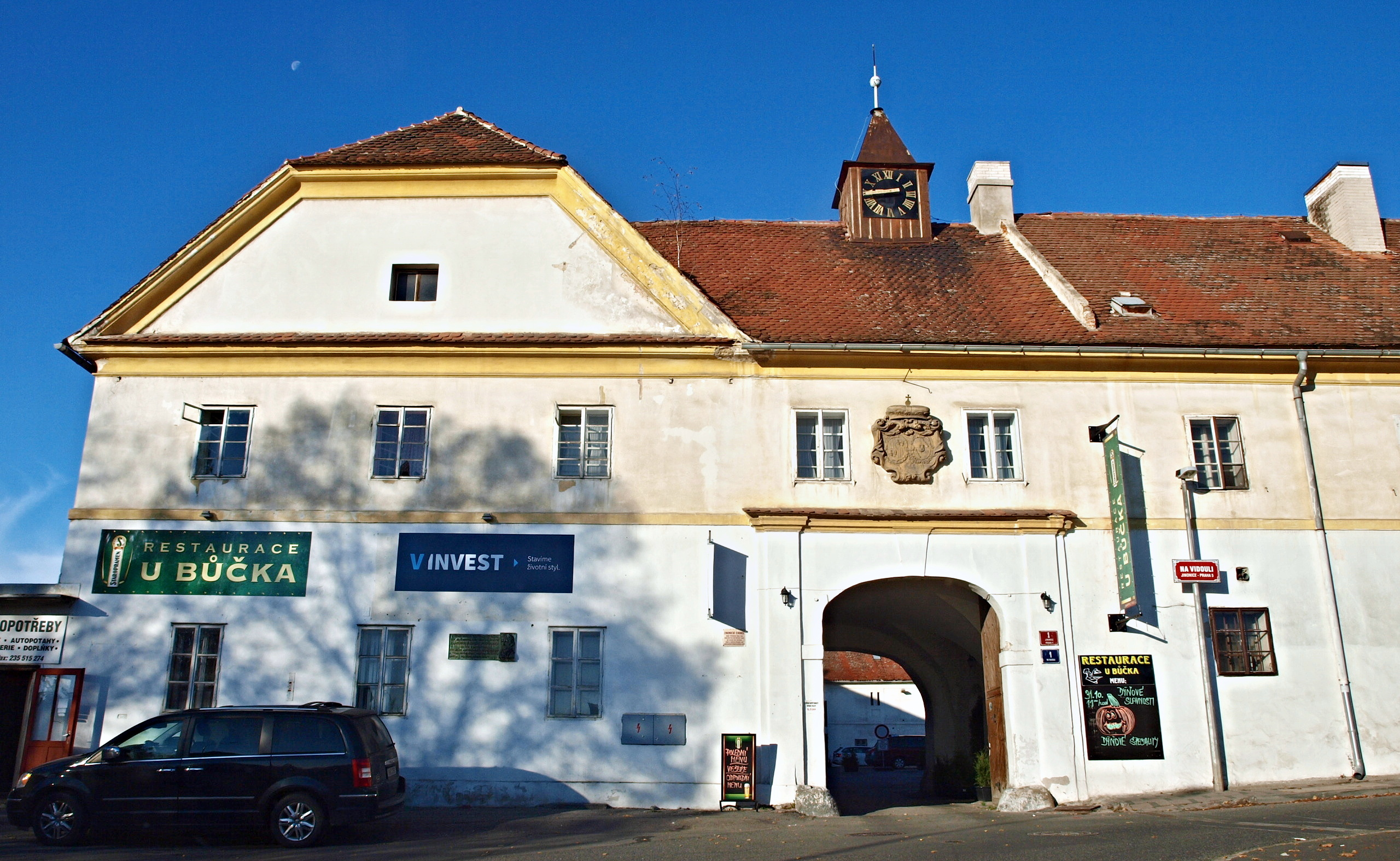 Jinonický zámeček